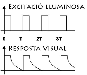 Resposta visual de l'ull davant un element d'excitació lluminosa.